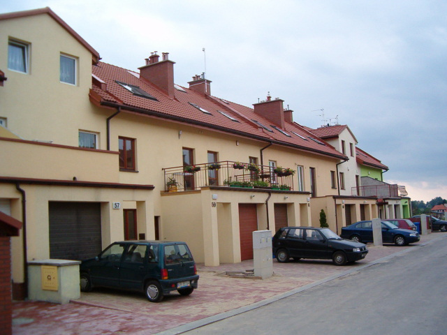 Krakow - Górka Narodowa - zabudowania szeregowe.